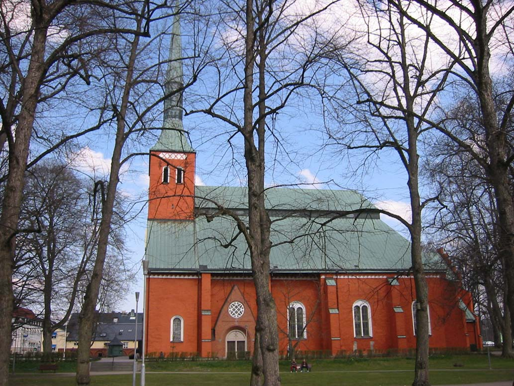 Växjö domkyrka från söder